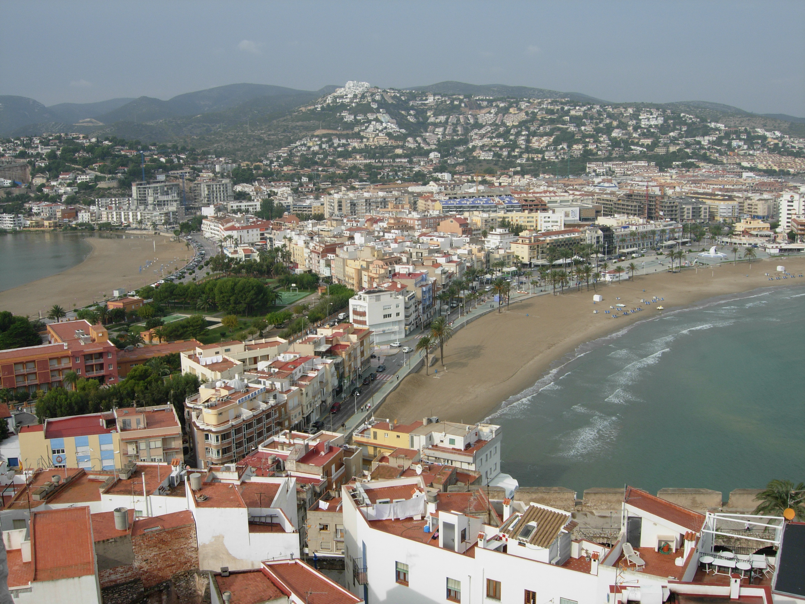 Peñiscola - playas.